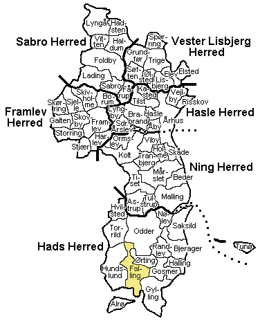 Kort : Falling Sogn, Hads Herred, Århus Amt